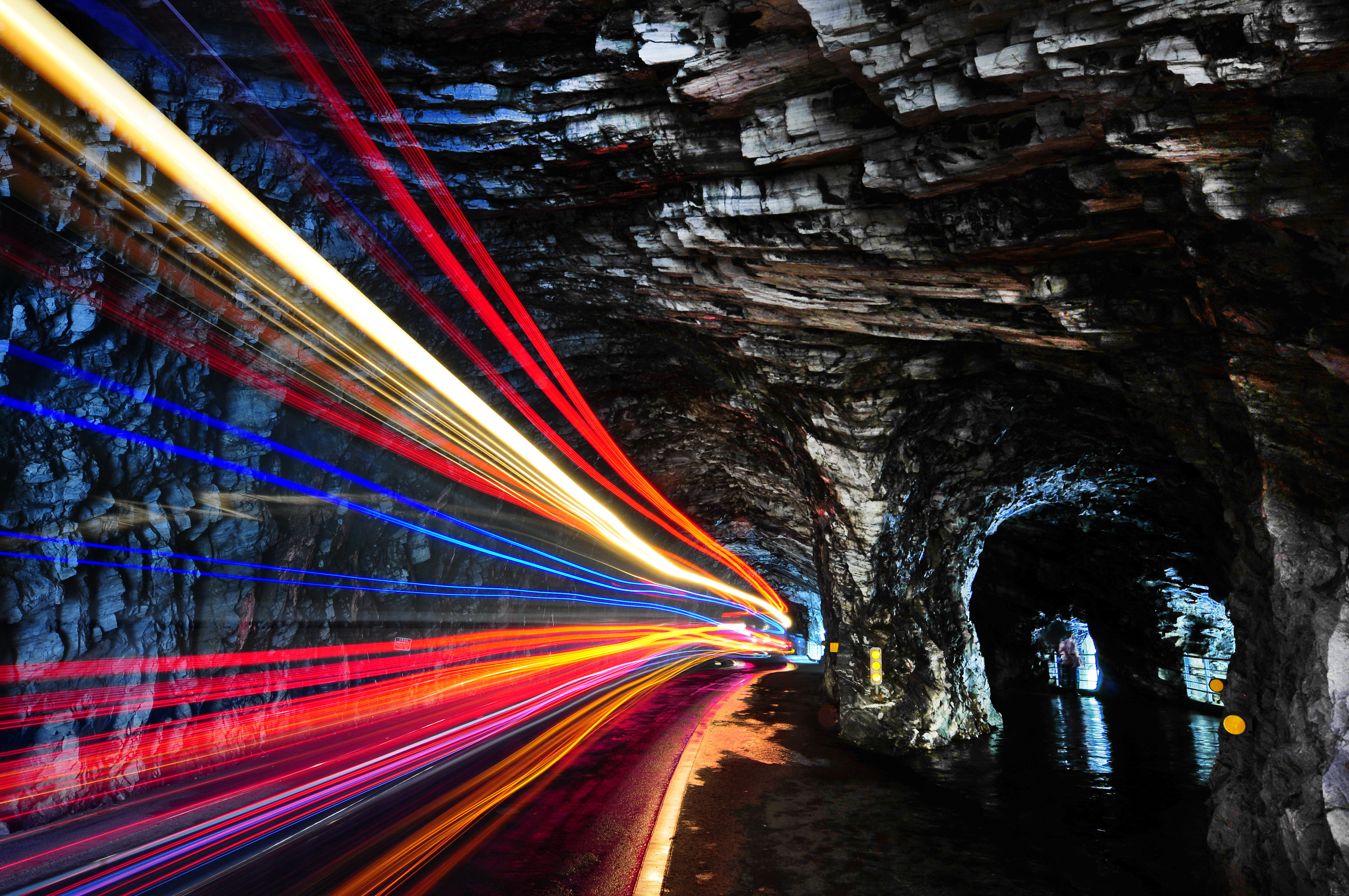 02. 太魯閣燕子口隧道。